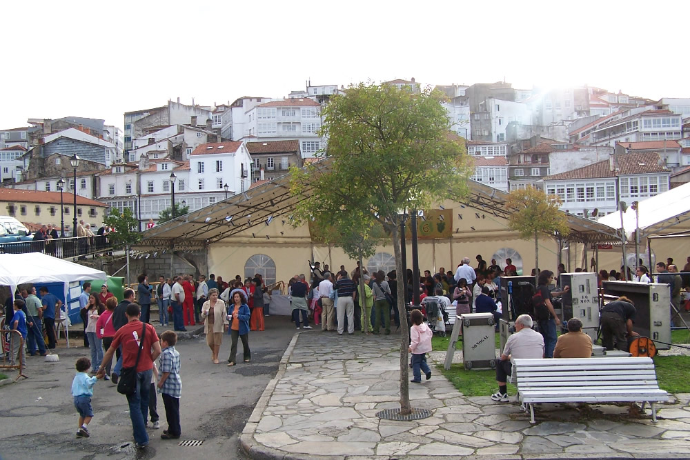 Festa do mosto en Betanzos